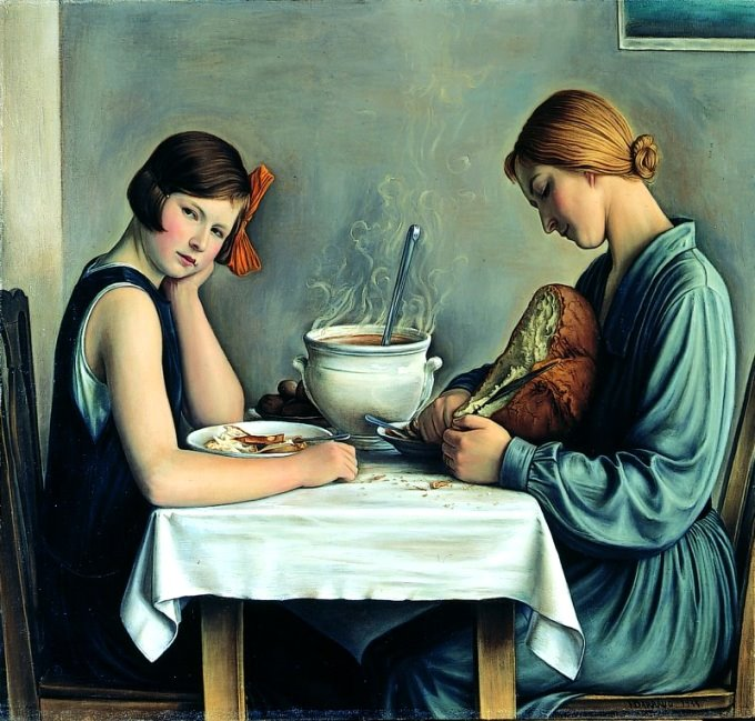 La Tailleuse de Soupelabel QS:Lfr,"La Tailleuse de Soupe"